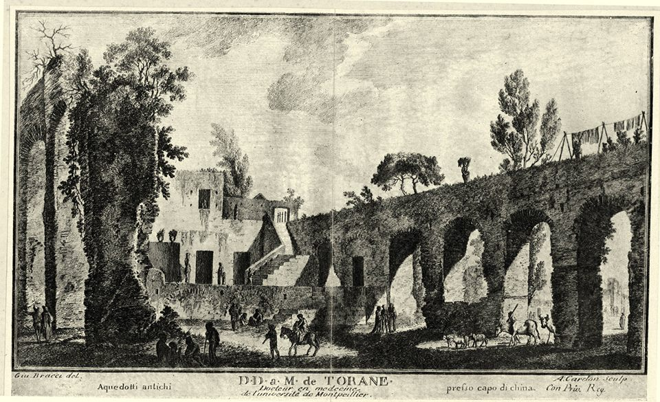 Napoli, i Ponti Rossi. ("Aquedotti antichi presso capo di chino") Incisione di Antoine Cardon.